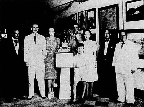 Fotografia dos artistas e autoridades presentes na abertura do IV Salão de Belas Artes de Guaratinguetá, em 1944. A quarta pessoa da esquerda para a direita é o pintor Ernesto Quissak. Publicada no suplemento do jornal A Noite em 7 de março de 1944.